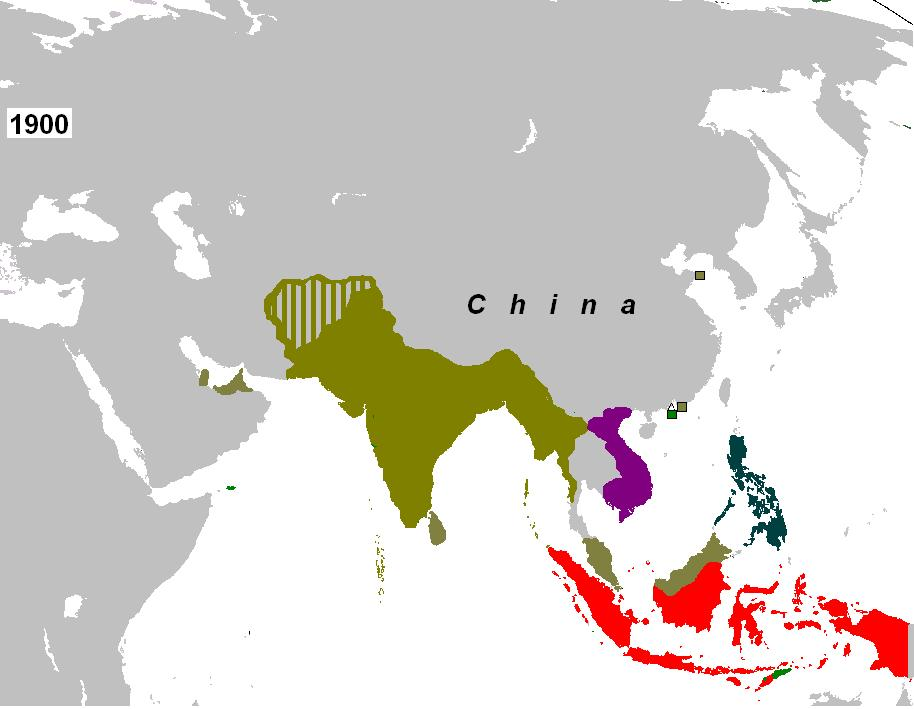 kolonisasie van asië